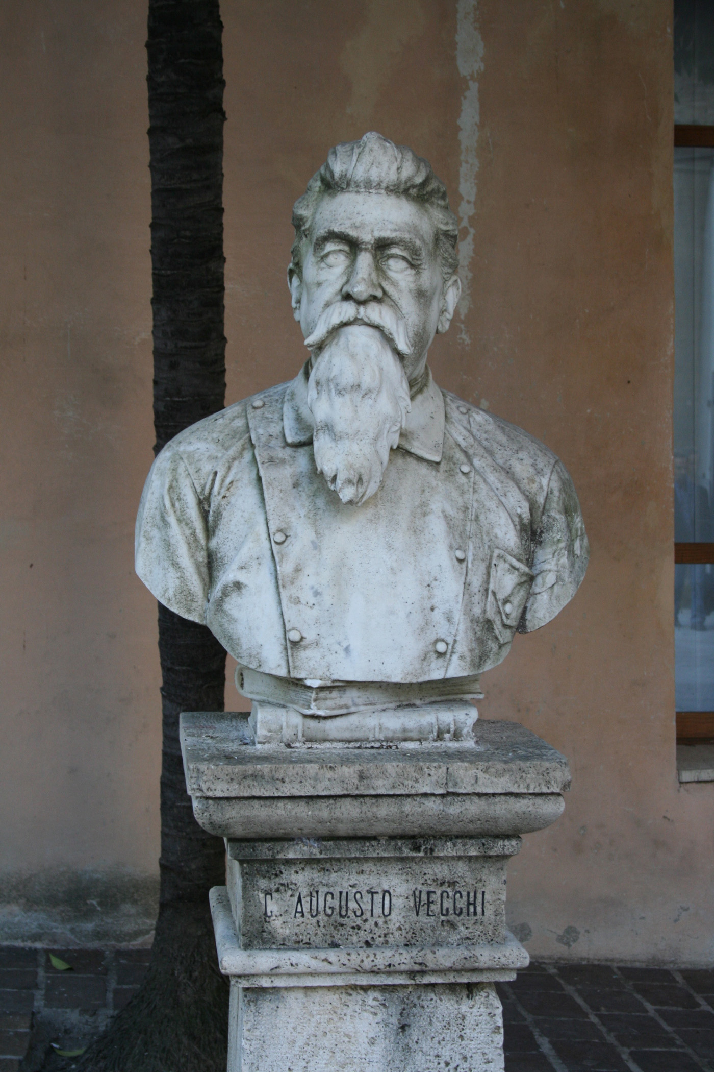 Busto di Candido Augusto Vecchi, patriota e storico italiano, conservato presso Palazzo dell'Arengo di Ascoli Piceno